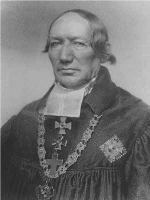 de;Carl Ritschl, Porträt im Landeskirchlichen Archiv Greifswald